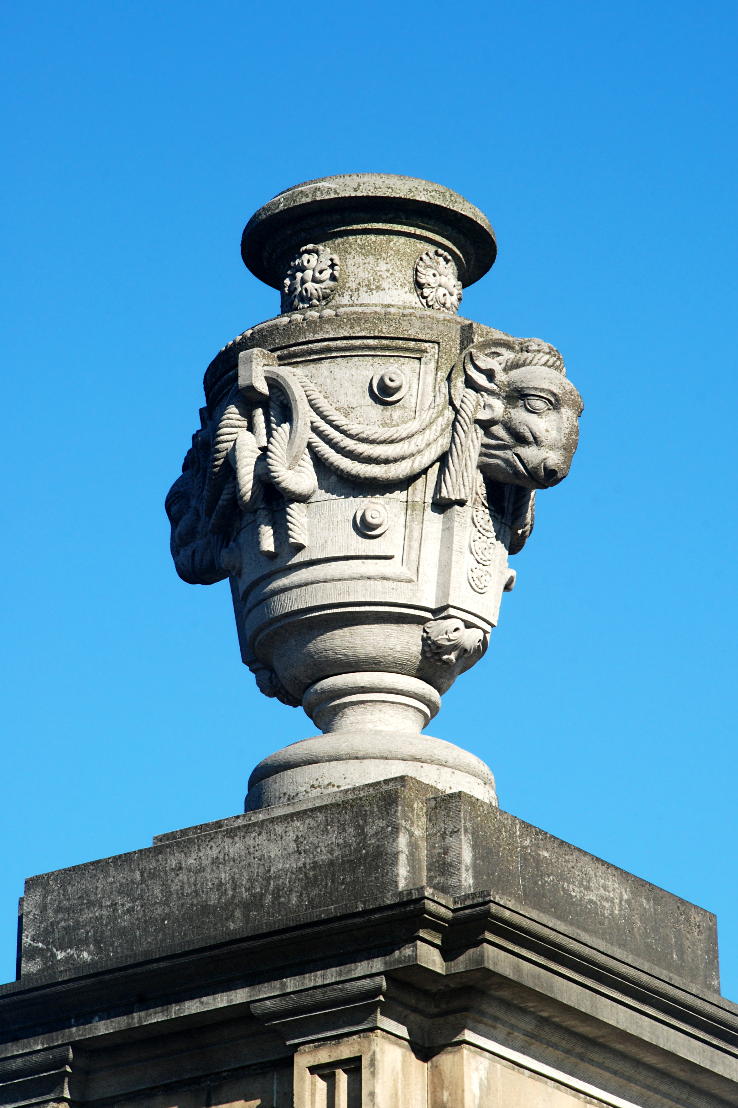 Belgique - Bruxelles - Écuries royales